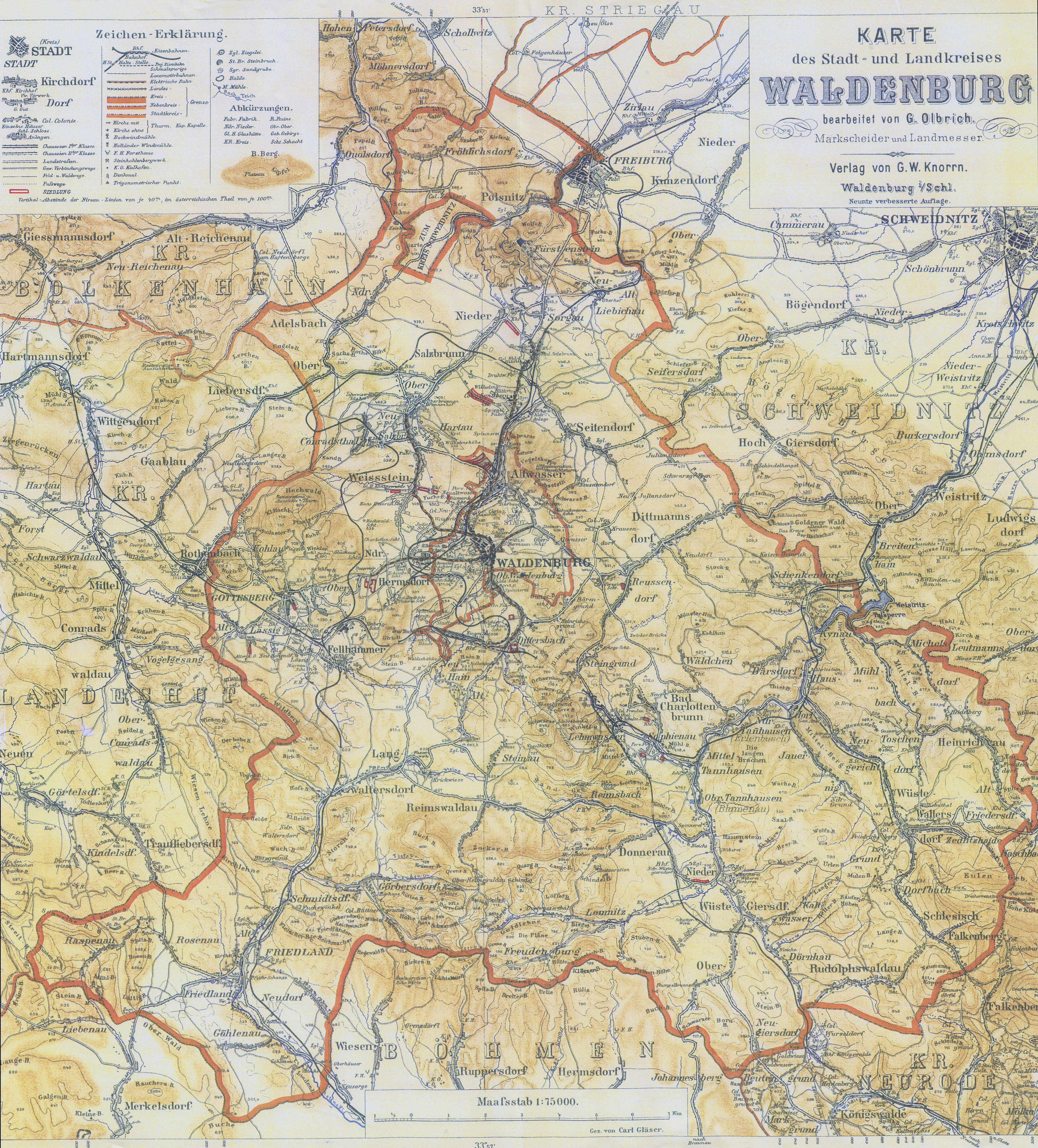 Karte des Stadt- und Landkreises Waldenburg